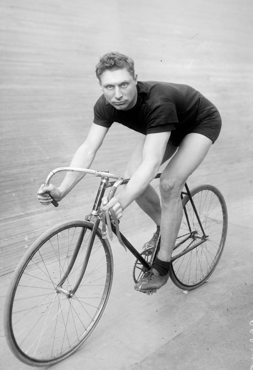 [Piet] Moeskops [coureur cycliste néerlandais participant au meeting de la Toussaint, 1er novembre 1919] : [photographie de presse] / [Agence Rol]